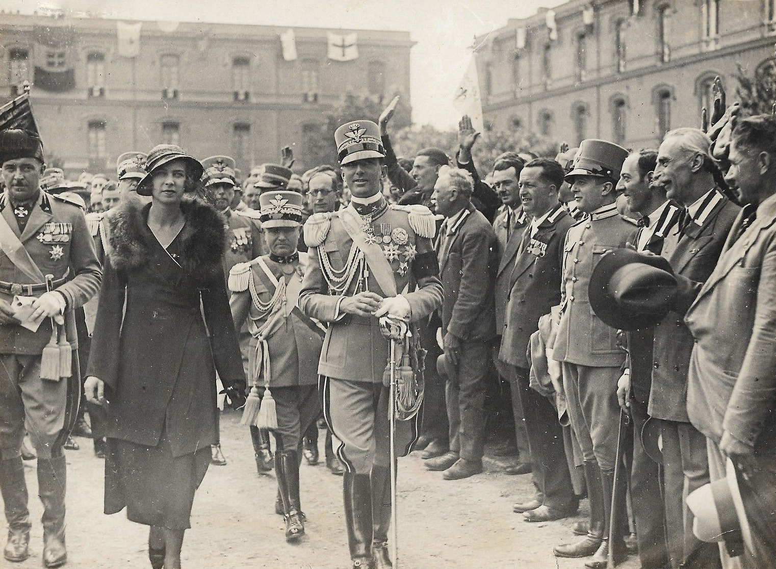 Partecipazione dei Principi di Piemonte al 1°Raduno Nazionale dei Granatieri di Sardegna in congedo